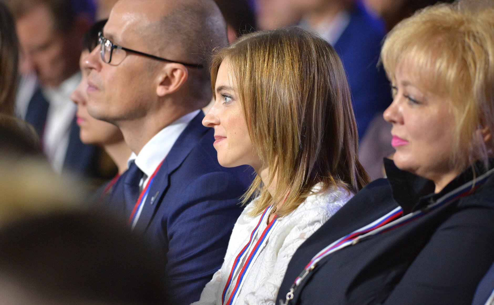 Депутат Государственной думы Федерального Собрания Российской Федерации VII созыва Наталья Владимировна Поклонская во время проведения Межрегионального форума Общероссийского народного фронта «Форум действий. Крым» в Ялте